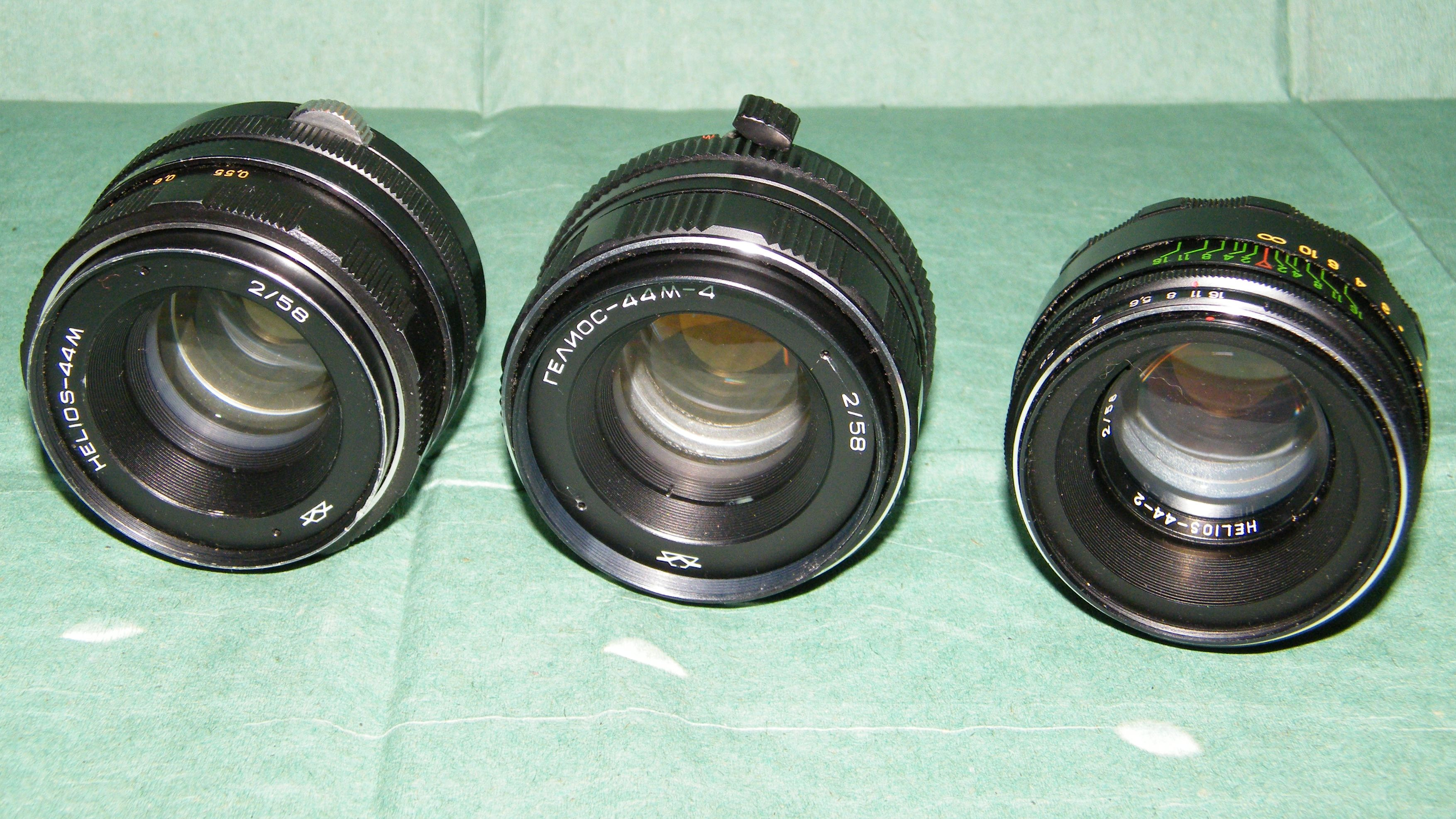 Объективы Гелиос-44-2, Гелиос-44М-4 и Гелиос-44М